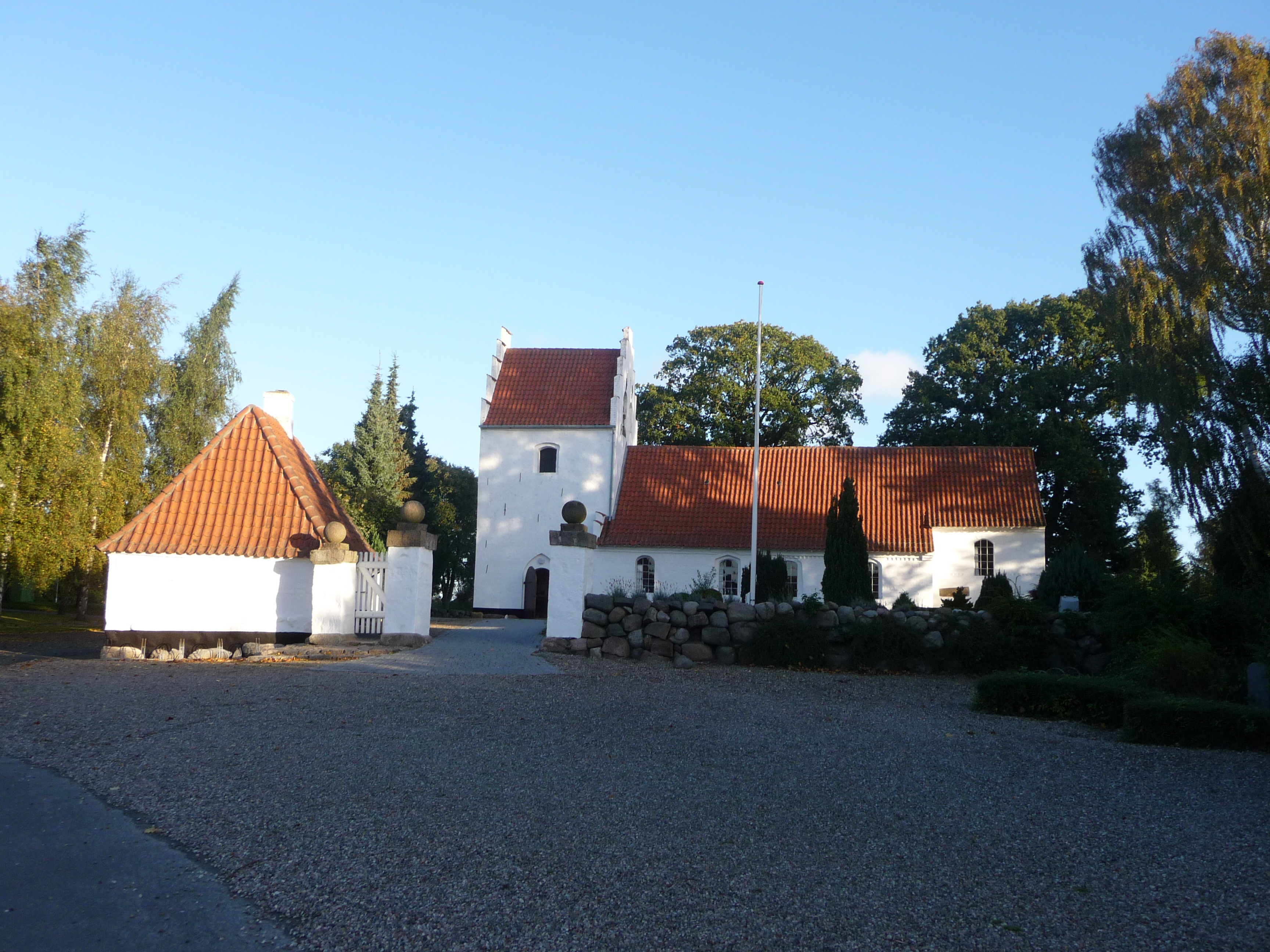 Seden kirkes front